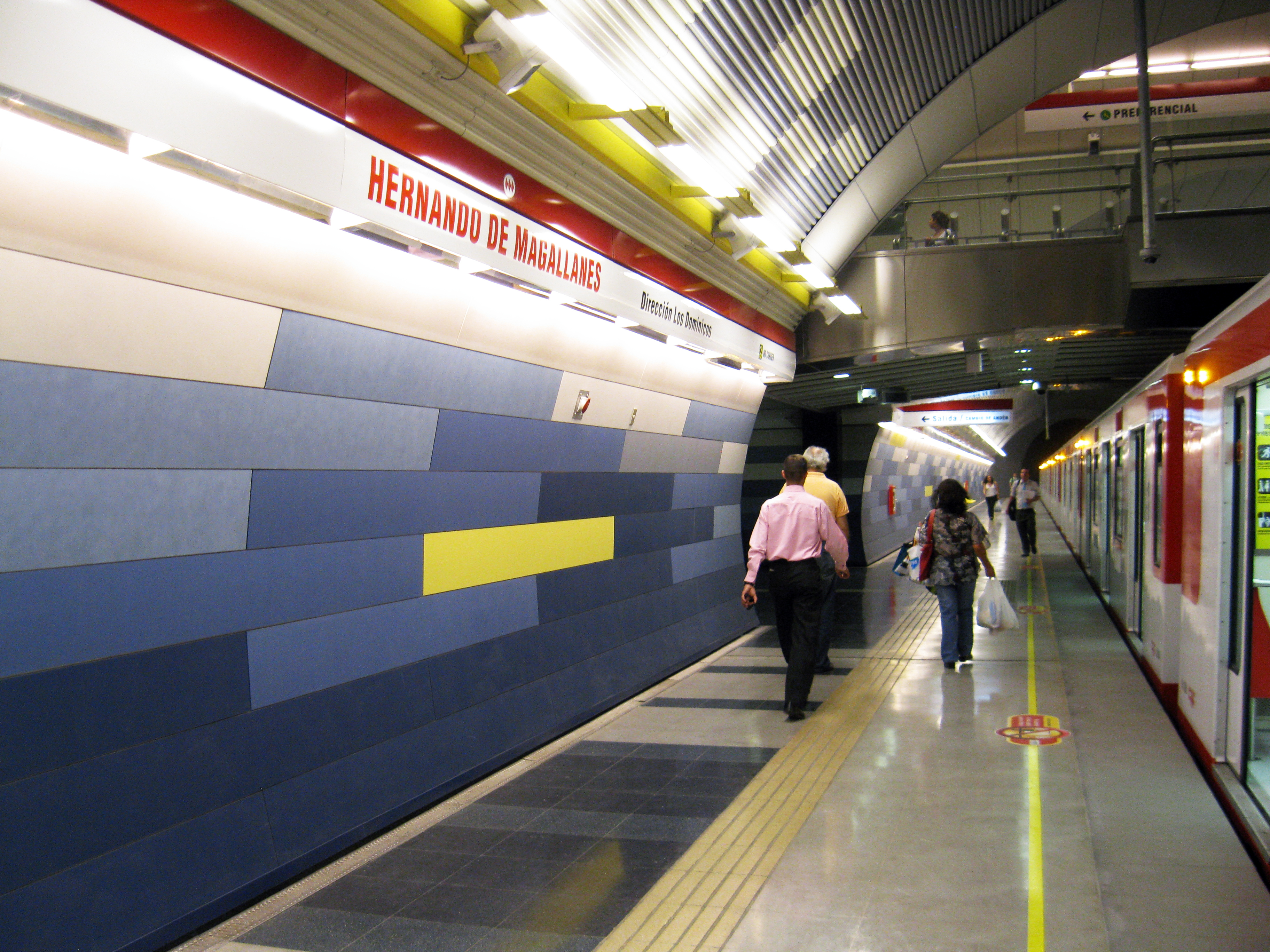 Estación Hernando de Magallanes, Metro de Santiago